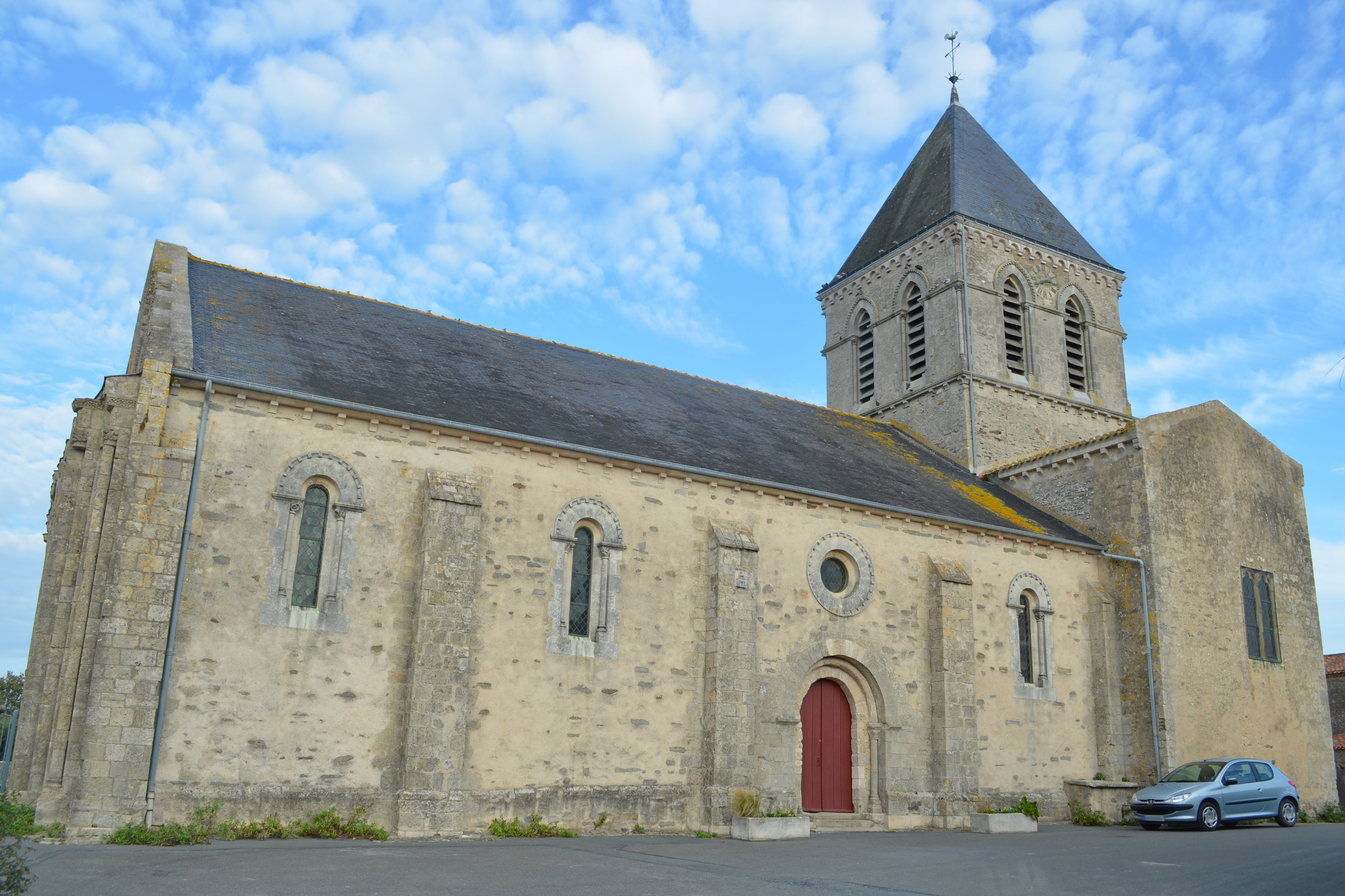 Eglise de La Chaize-Giraud (Vendée)